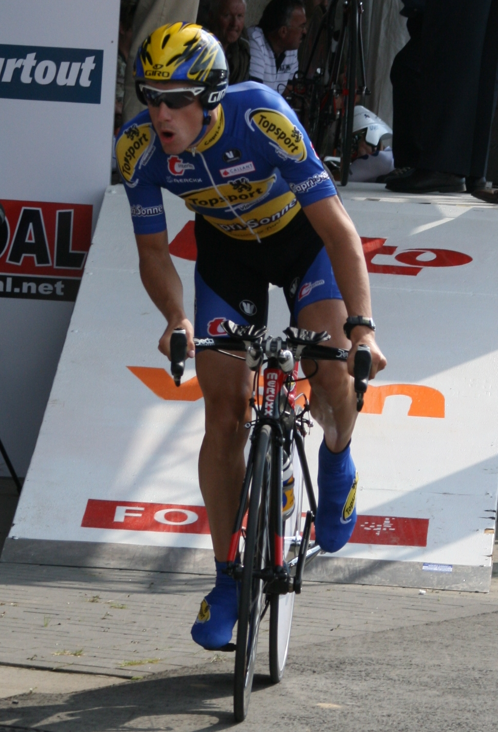 Kristof Vandewalle au championnat de Belgique du contre-la-montre